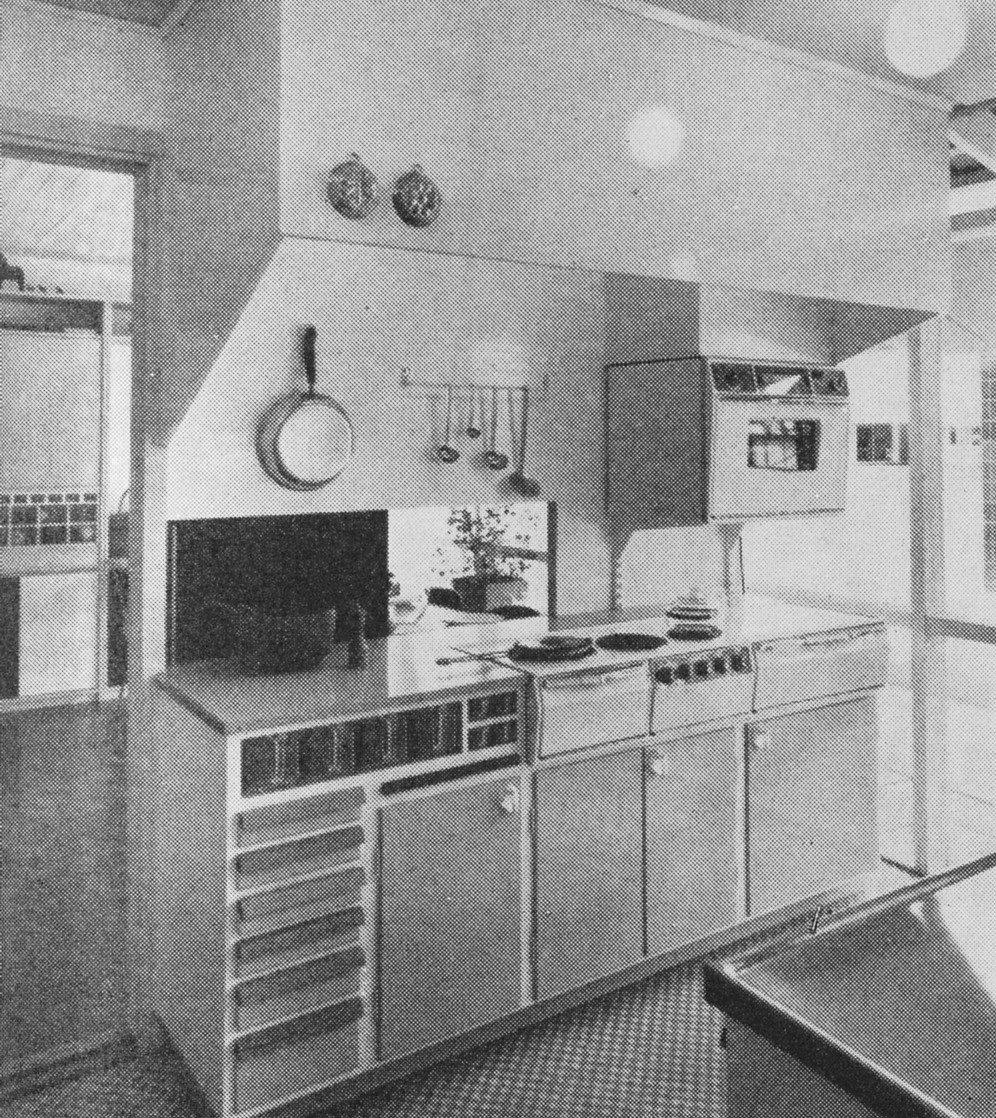 Enfamiljshuset "Skal och kärna", köket